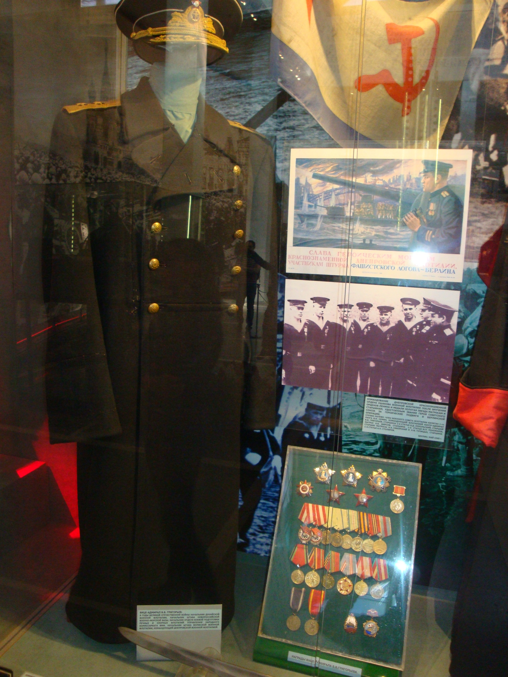 Награды Григорьева